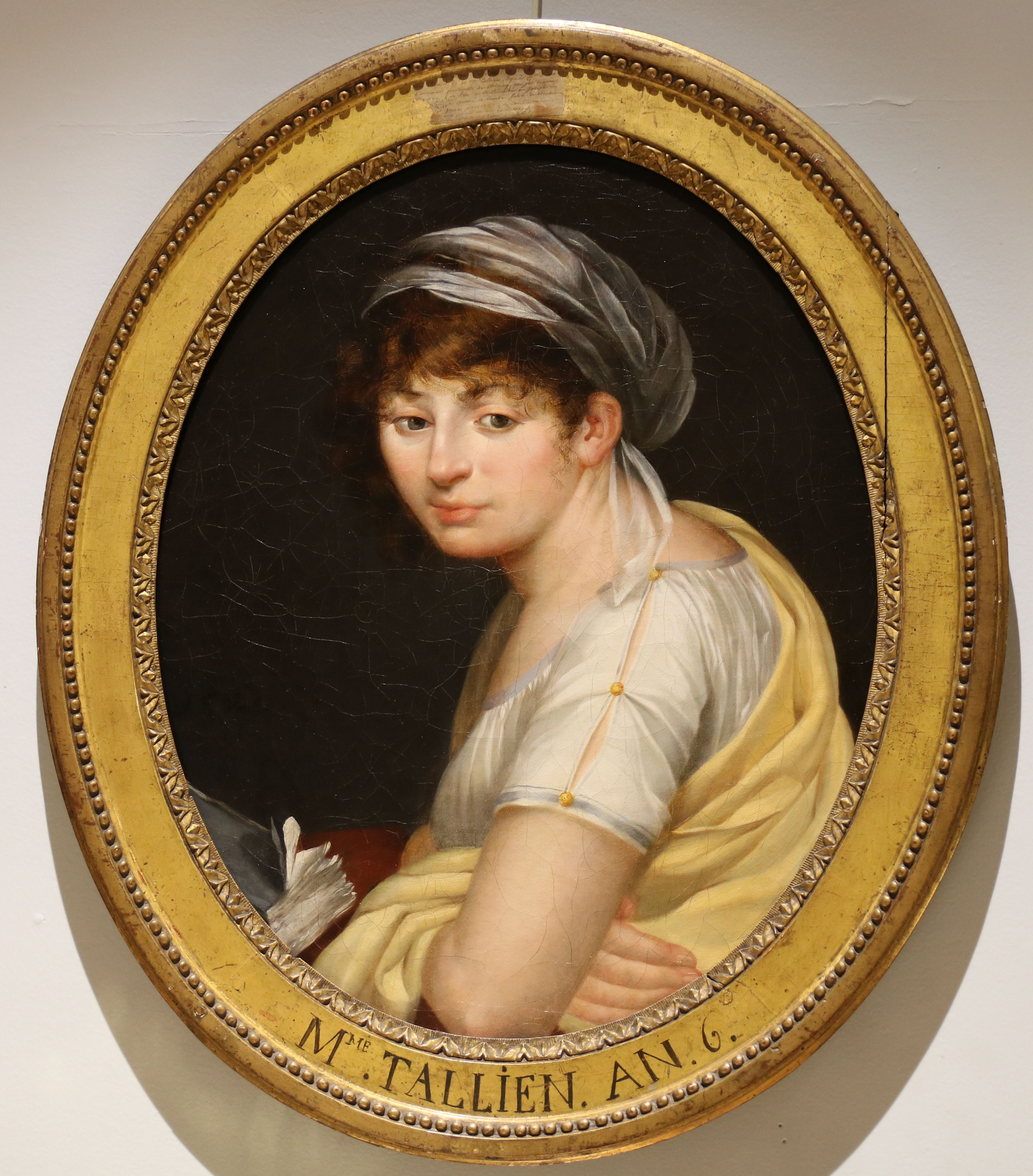 A.T. Dumilieu - Portrait de madame Tallien -huile sur toile - 1798